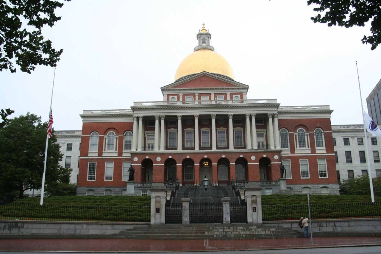 Massachusetts State Capitol in Boston